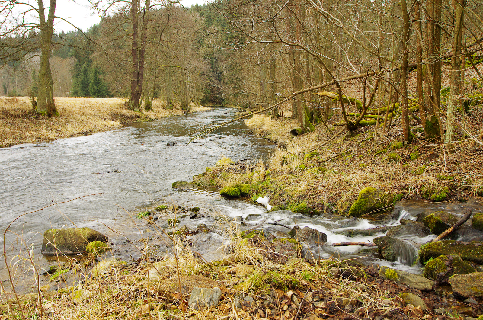 řeka Teplá v místě soutoku s Novoveským potokem, na hranici okresů Sokolov a Karlovy Vary